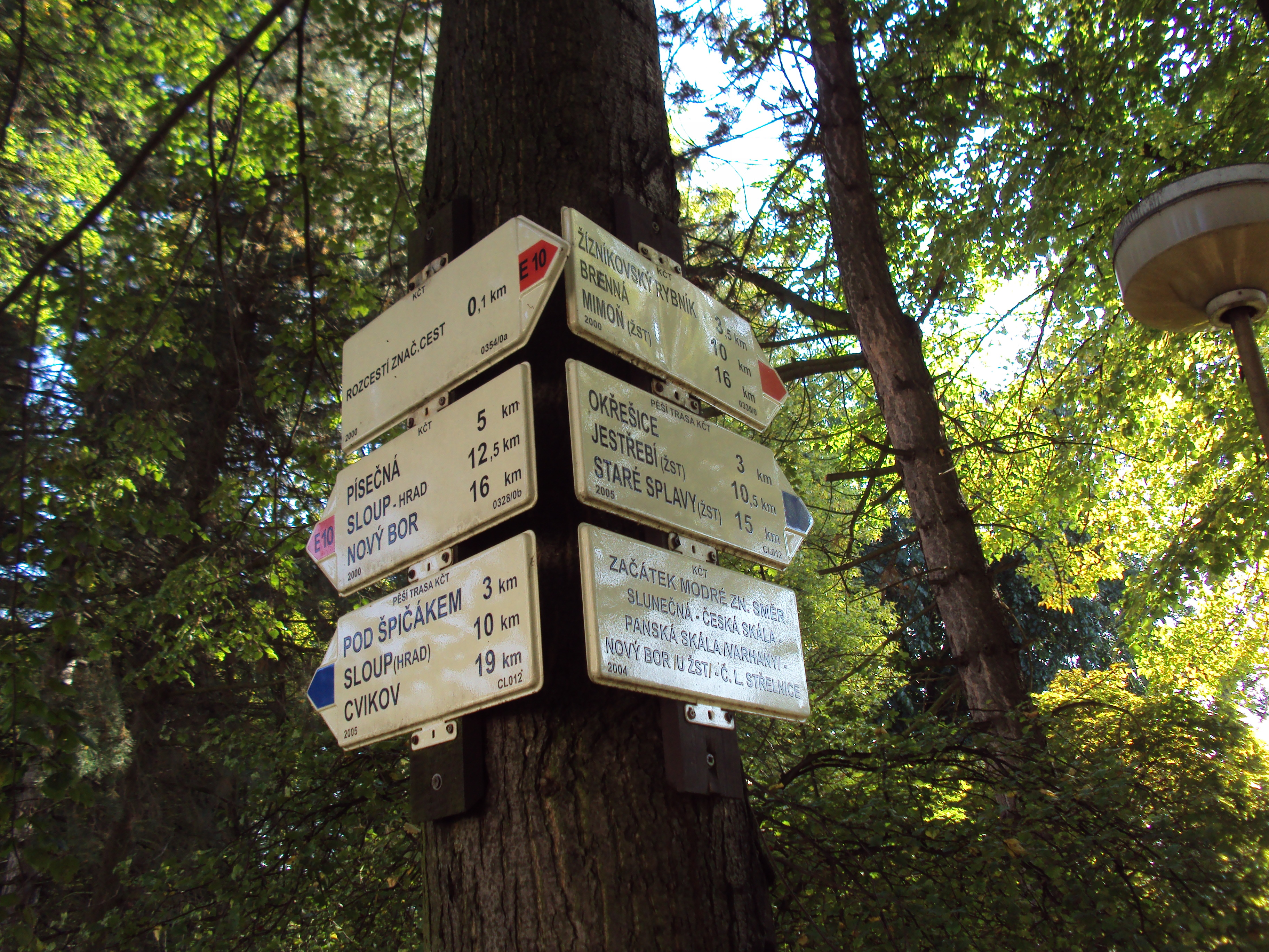 Rozcestník KČT CL012 u podchodu na bus nádraží v České Lípě, mezinárodní trasa E10 (0328), červená 0335 a modrá trasa.